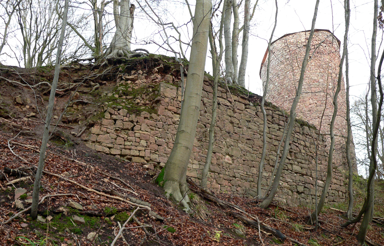 Bramburg